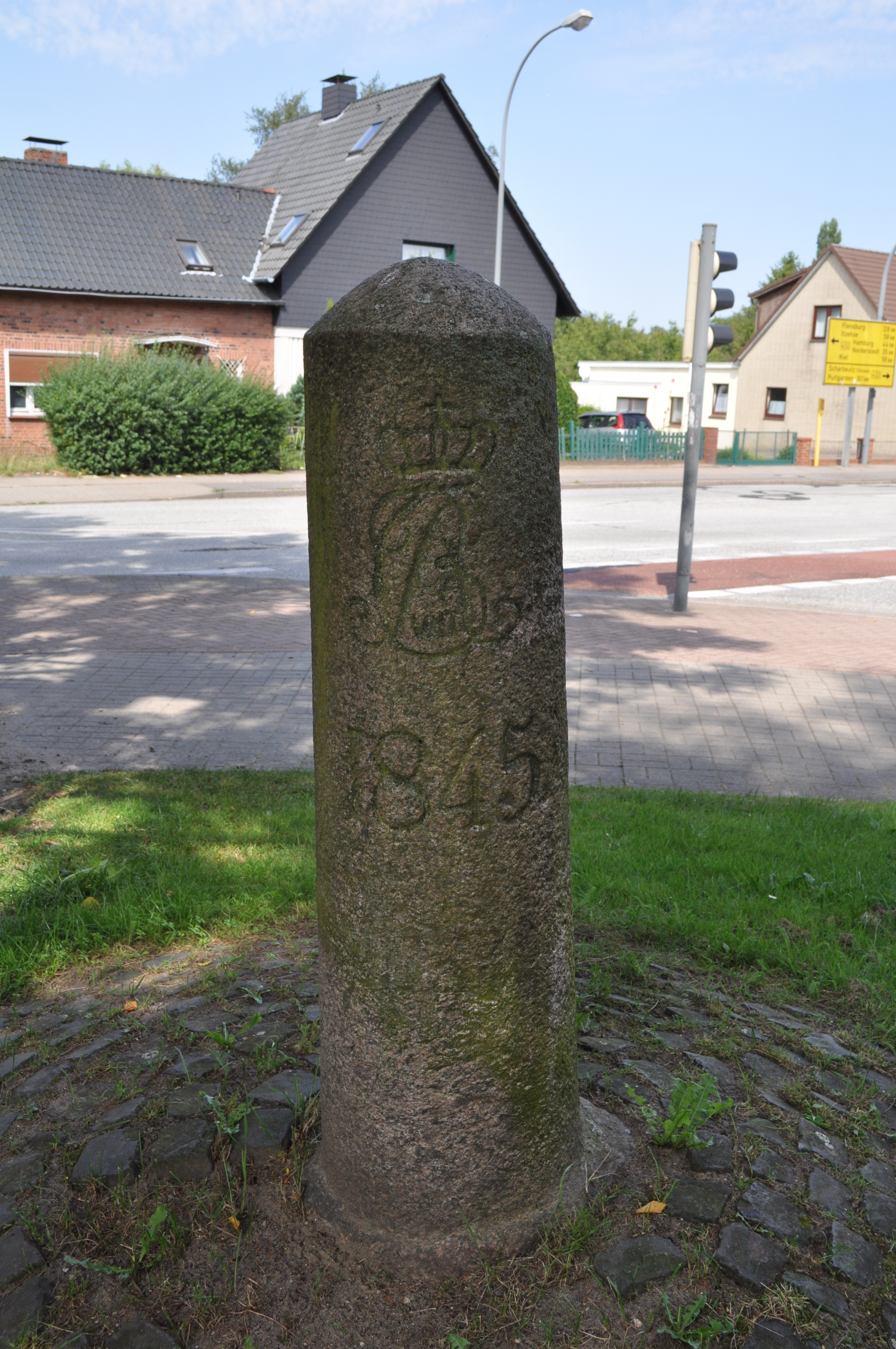 Königsmonogramm und Jahreszahl auf der Rückseite des Drittelmeilensteins an der Altona-Neustädter Chaussee in Bad Segeberg. Entfernung nach Altona 7 1/3 Meilen (55 km), nach Hamburg 6 5/6 Meilen (52 km) und nach Neustadt 5,62 Meilen (42 km). Auf der Vorderseite befinden sich die Entfernungsangaben nach Altona und Hamburg, auf der Rückseite ein Königsmonogramm Christians VIII und die Jahreszahl 1845. Der Stein ist an der Altona-Neustädter Chaussee jeweils der einzige Drittelmeilenstein, Stein mit Königsmonogramm, Stein mit Jahresangabe und der einzige Stein der sich heute auf der Südseite der Chaussee befindet. This is a photograph of an architectural monument.